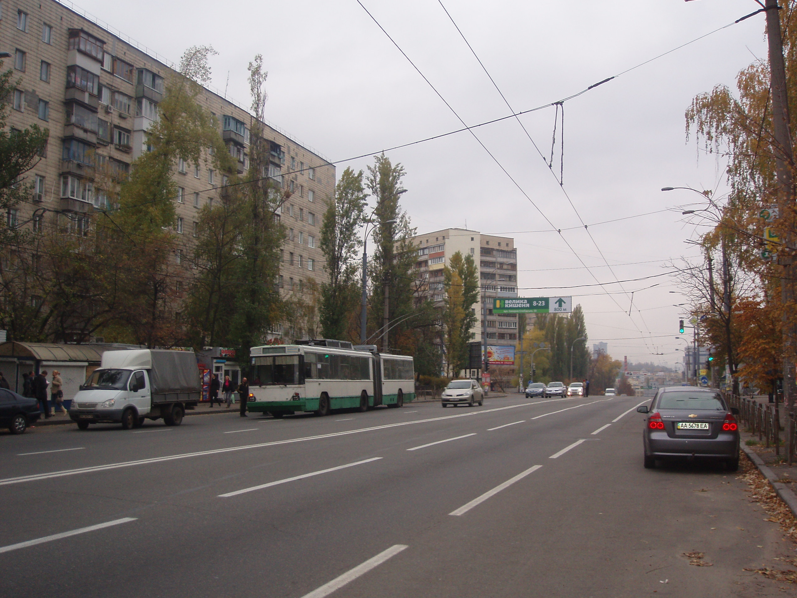 Проспект Науки (Київ), жовтень 2010 року